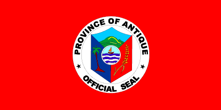 Dit materiaal is afkomstig van of en is door de auteur Jaume Ollé als GFDL beschikbaar gesteld, zie de toestemmingsemail. Hiermee vervallen de strictere voorwaarden in de disclaimers op de genoemde sites.Vrijgegeven bijdrage op Flags of the World van Jaume Olle. Zie deze verklaring op de Spaanstalige Wikipedia. GNU FDL